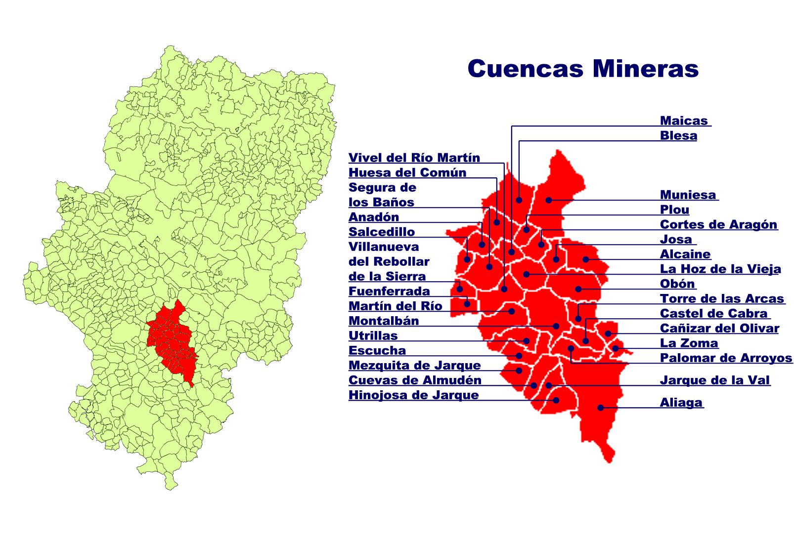 Comarca de las Cuencas Mineras Creado el 09.11.2005 por Ecelan en base a Image:Aragon municipalities.png